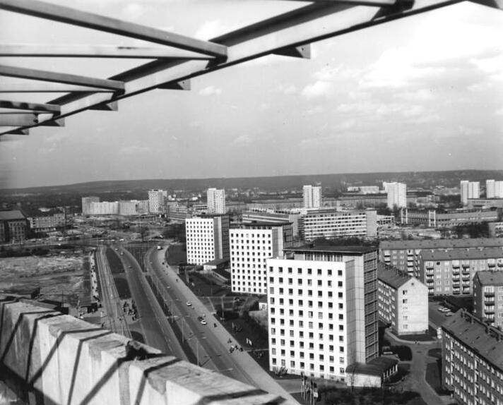 Dresden, Leningrader Straße, Wohnblocks Zentralbild Häßler 2.5.1970 Dresden: Blick auf die Leningrader Straße- Die Christianstraße im Zentrum Dresdens erhielt am 22.4.1970 den Namen der Heldenstadt Leningrad.